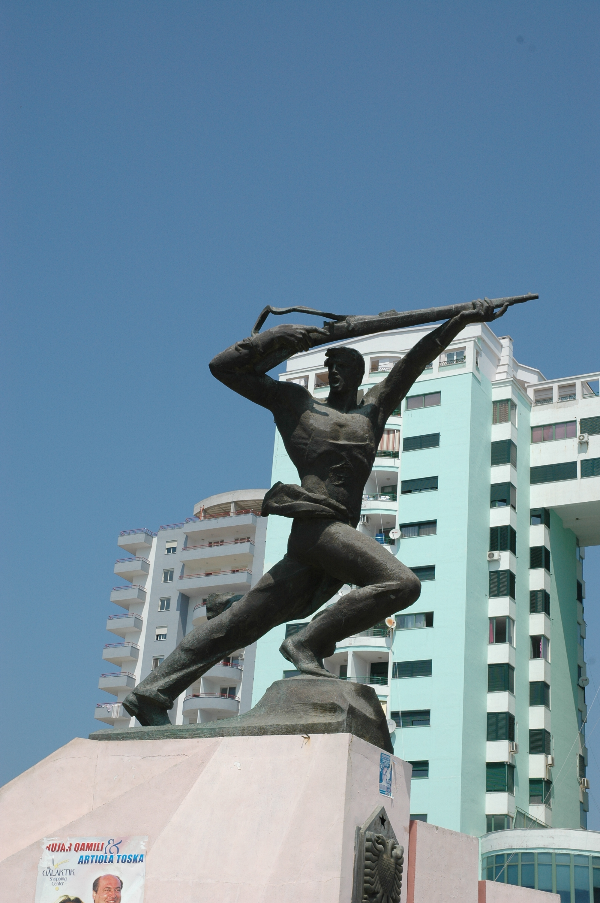 ?, Durrës, Albania